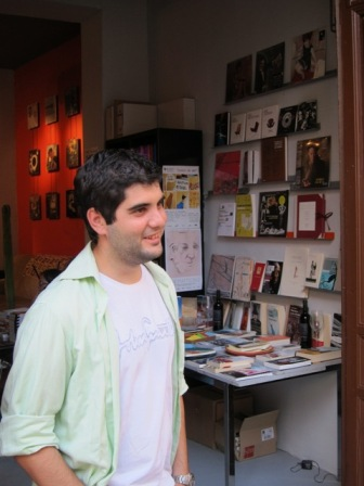 Juan Martín Salamanca durante una presentación en Málaga en 2012